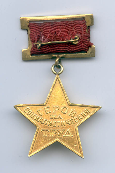 Знак на почетното звание „Герой на социалистическия труд“